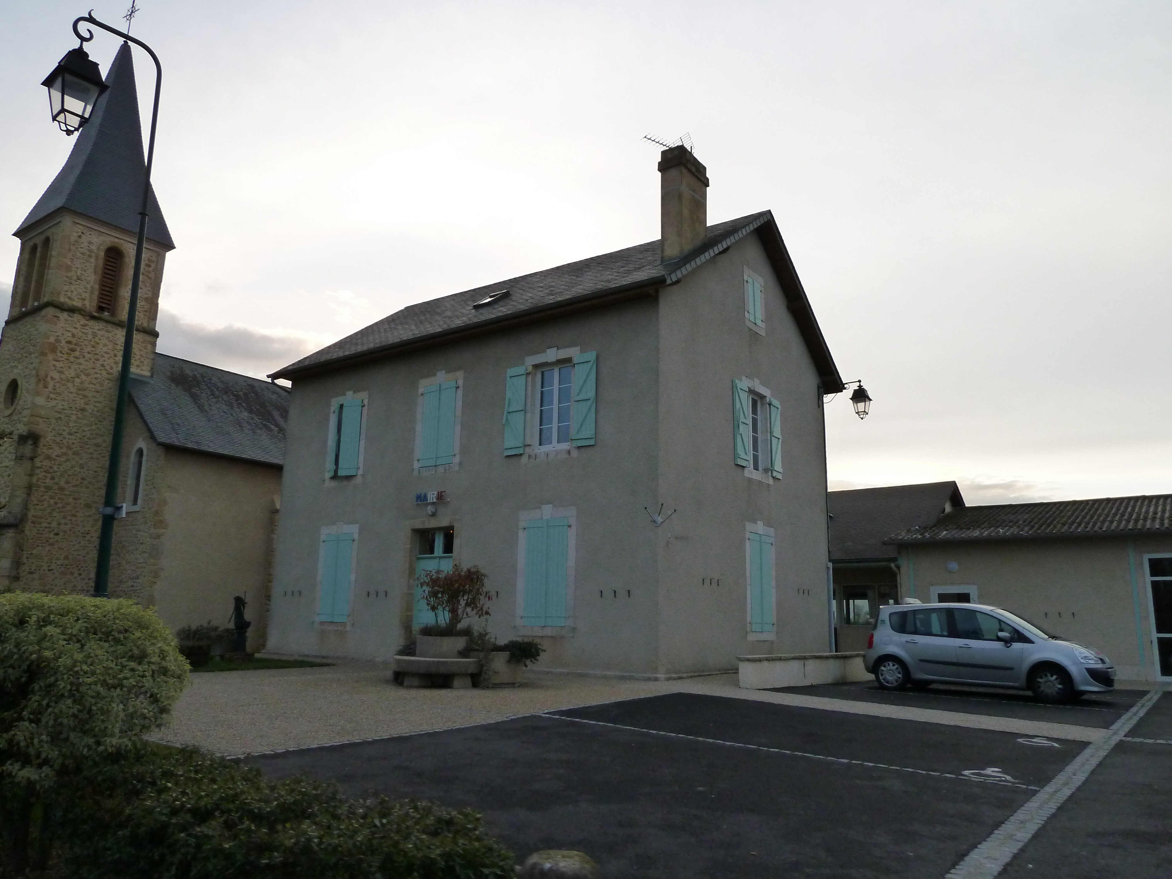 Mairie de Vignes (Pyrénées-Atlantiques)